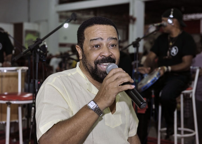 Feijoada na quadra da Unidos do Porto da Pedra. Foto: Ricardo Almeida.